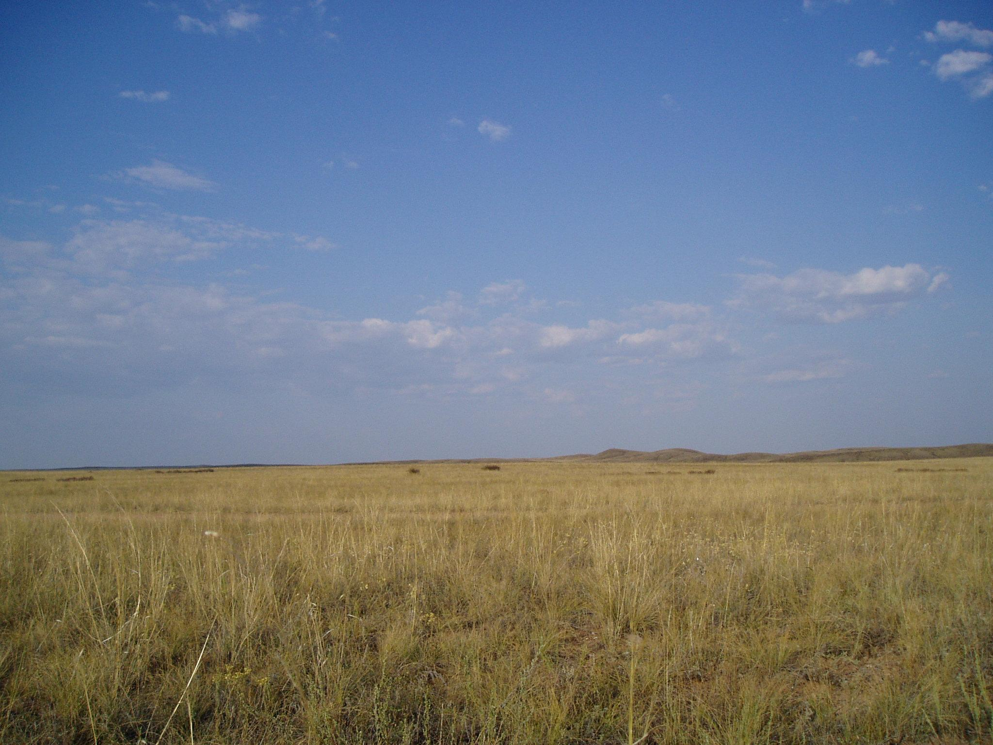 Казахстан. Степь в районе озера Балхаш.